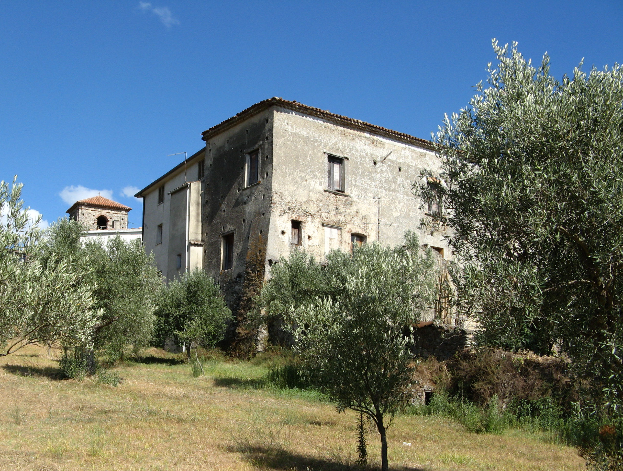 Pittarella, Palazzo baronale (XVI secolo)